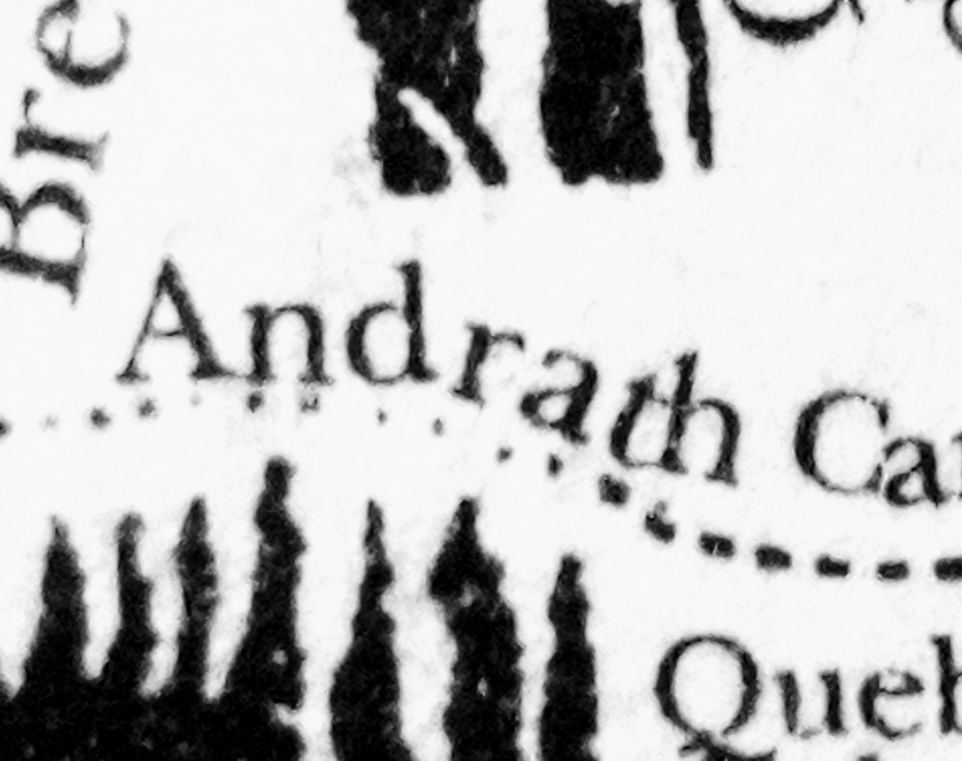 El desfiladero de Andrath, en el mundo ficticio de Arda, continente de la Tierra Media y región de Eriador.